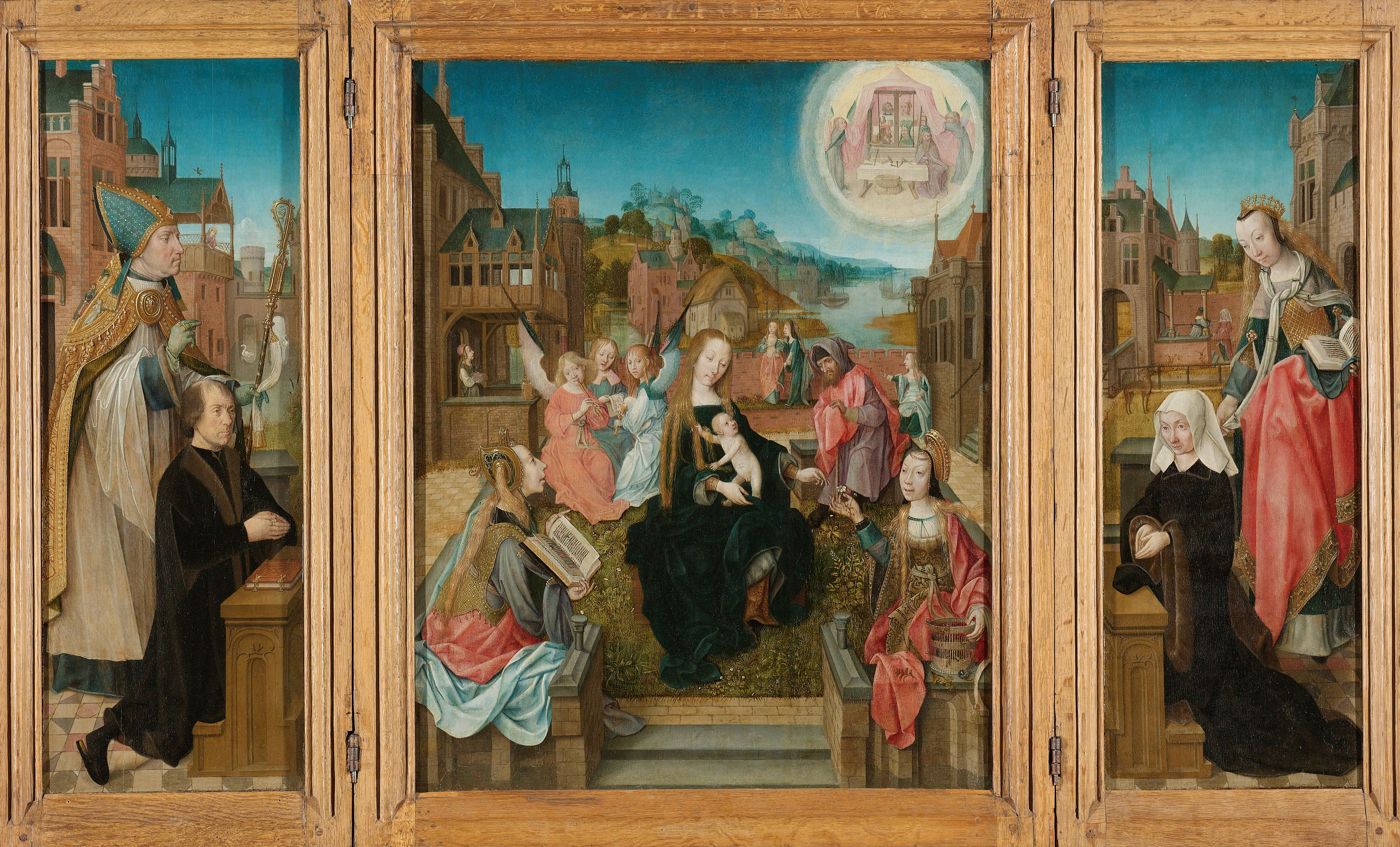 Drieluik met op het middenpaneel Maria zittend met het Christuskind op schoot in het ommuurde hof van een kasteel. Vooraan twee sibyllen met een boek en een bloemenmand, linksachter drie musicerende engelen, rechts Jozef. In de lucht een visioen in een aureool van God zittend bij een tabernakel waarin een retabel met de passiewerktuigen of Arma Christi. Op het linker zijvleugel de knielende stichter met de heilige Martinus (Sint Maarten), op het rechter zijvleugel de knielende stichteres met de heilige Cunera. De zijpanelen vertonen in gesloten staat de Verkondiging in grisaille. Volgens Diederik Enklaar vertoont de heilige Martinus gelijkenis met David van Bourgondië (1427-1496), bisschop van Utrecht.